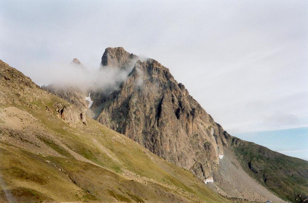 Middi d'ossau